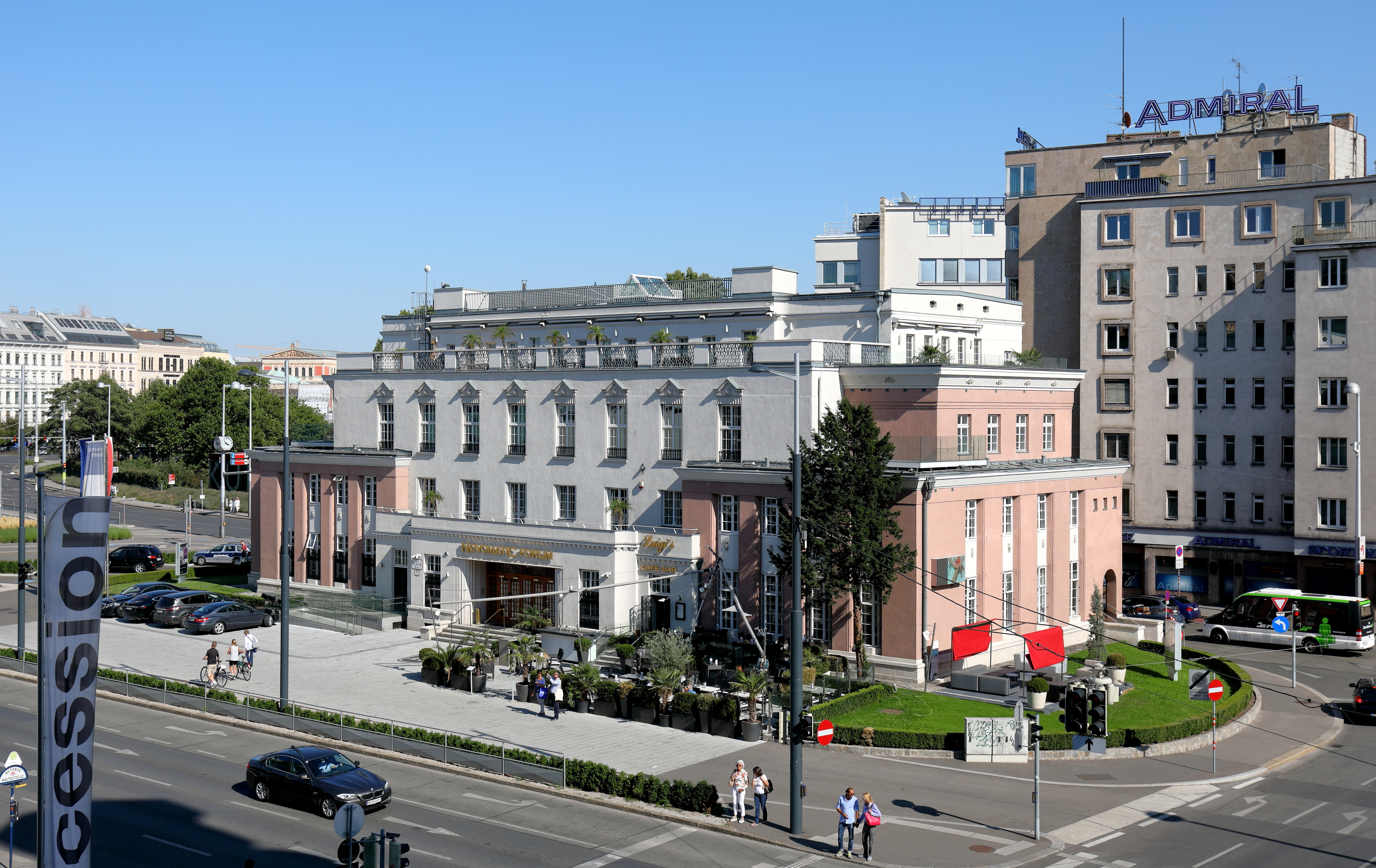 Westansicht der ehemaligen Zentrale des Österreichischen Verkehrsbüros an der Adresse Friedrichstraße 7 im 1. Wiener Gemeindebezirk Innere Stadt.Das Gebäude im Stil des Art Déco und Jugendstils wurde von 1922 bis 1923 nach Plänen der Architekten Hermann Aichinger und Heinrich Schmid errichtet. Im Jahr 2007 wurde es von Novomatic gekauft und von 2008 bis 2009 von dem Architekten Adolf Straitz renoviert und von einem Bürohaus in ein Kulturhaus (Novomatic Forum) umgebaut.